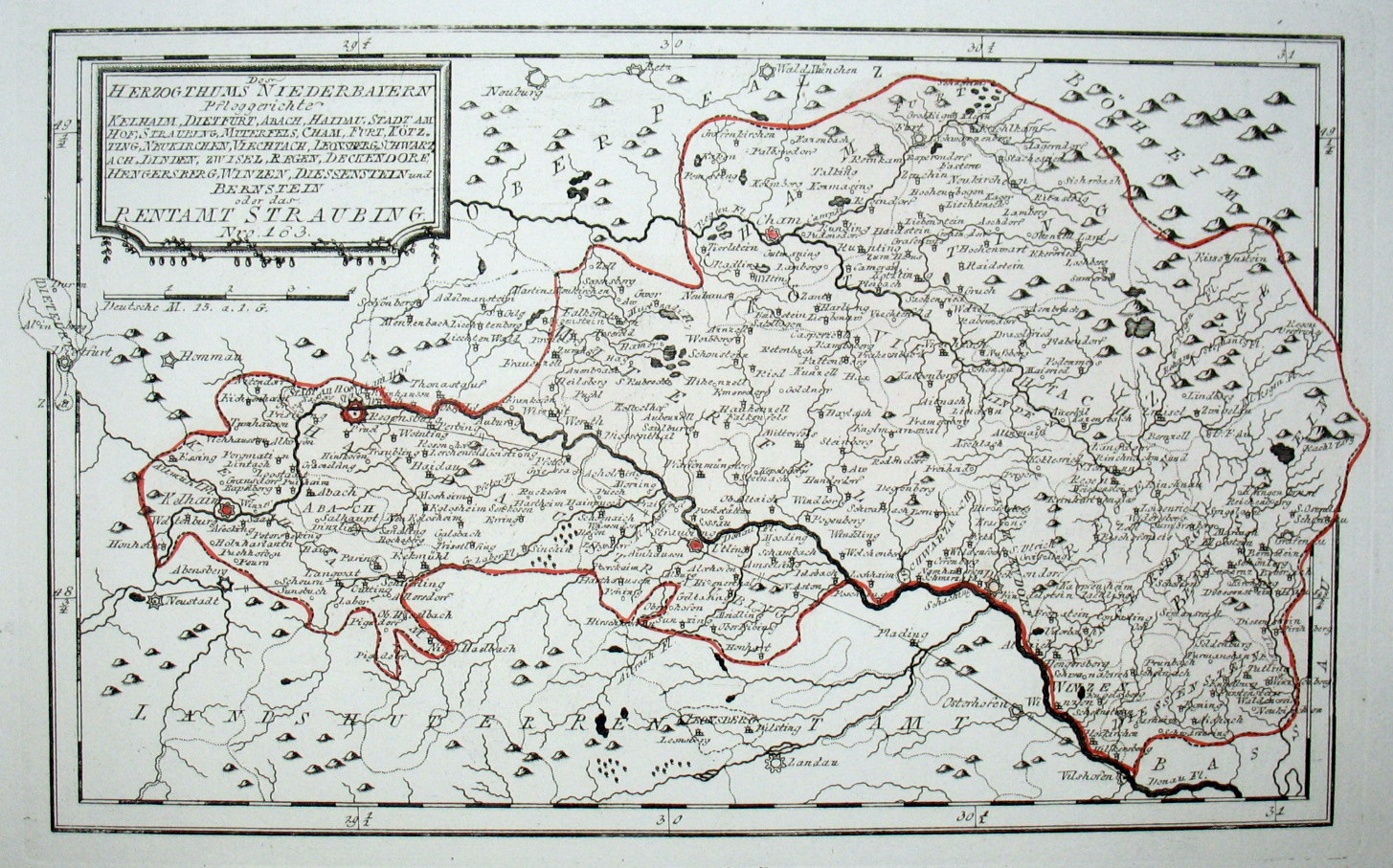 Des Herzogthums Niederbayern Pfleggerichte Kelhaim, Dietfurt, Abach, Haidau, Stadt am Hof, Straubing, Miterfels, Cham, Furt, Kötzting, Neukirchen, Viechtach, Leonsberg, Schwarzach, Linden, Zwisel, Regen, Deckendorf, Hengersberg, Winzen, Diessenstein und Bernstein oder das Rentamt Straubing. Nro. 163. Kolorierter Kupferstich